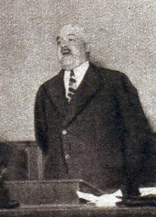 Roger Dantou Président de la Fédération Française de Rugby, en 1931.